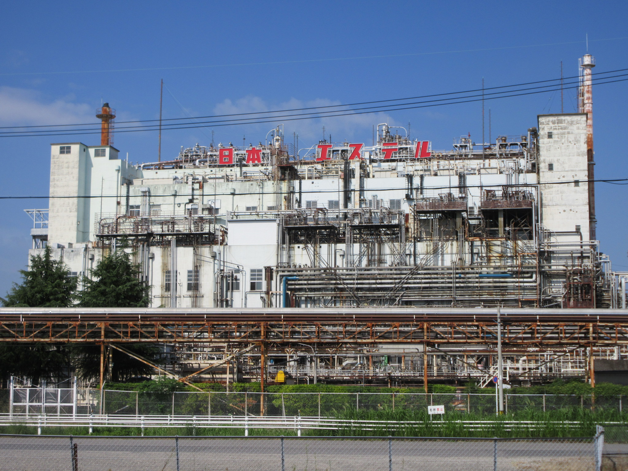 ユニチカ岡崎事業所／日本エステル岡崎工場（岡崎市日名北町）